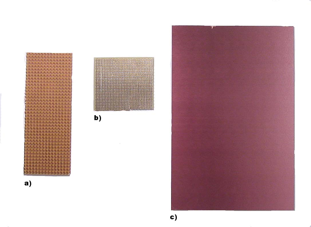 a) Stück einer Universalleiterplatte mit einem Rastermaß von 2,55 mm. b) Stück einer Universalleiterplatte mit einem Rastermaß von 1,27 mm. c) Kupferkaschiertes Basismaterial zur Herstellung von Leiterplatten im Euroformat von 160 mm x 100 mm.